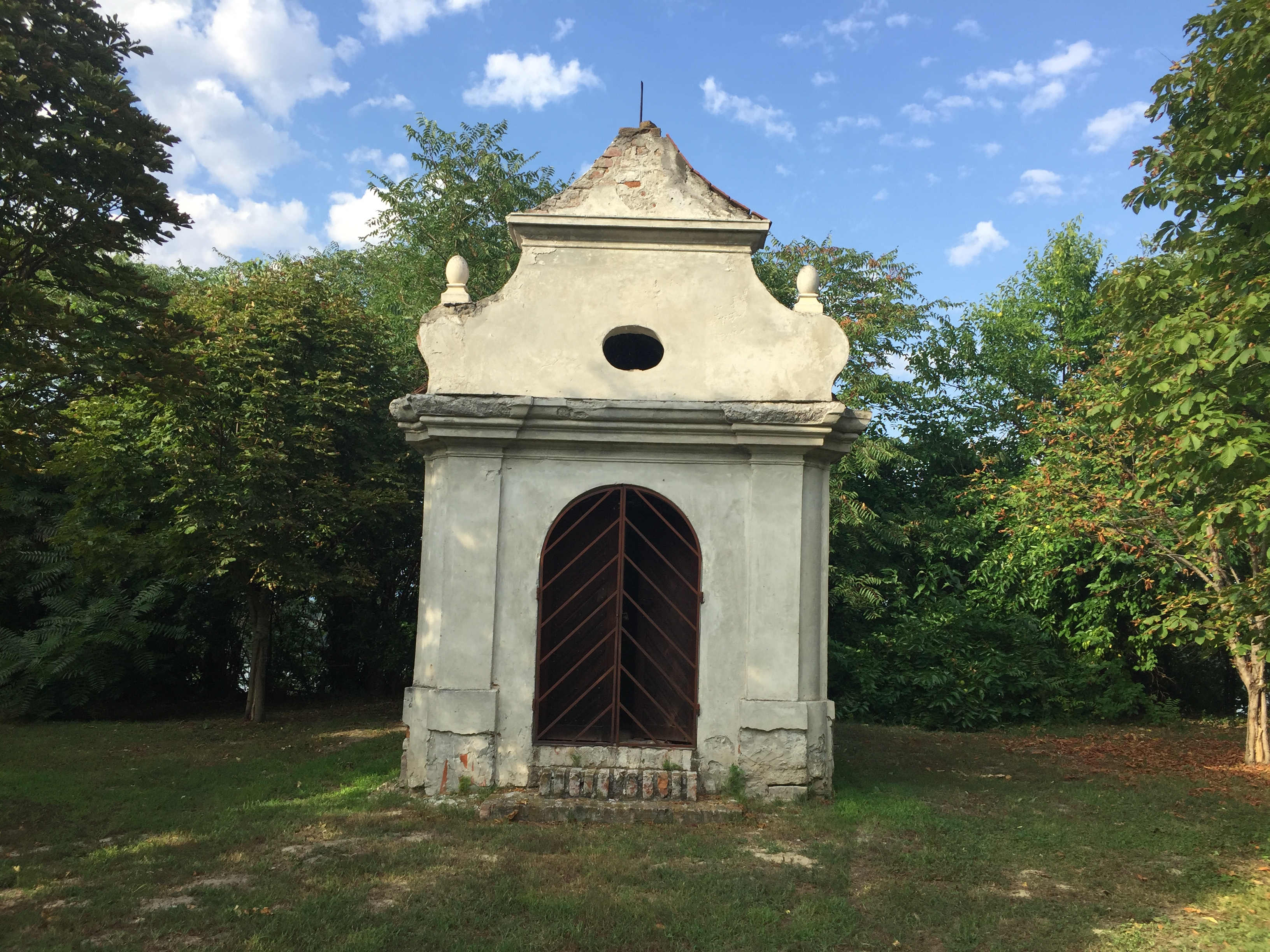 Kapelica sv. Ivana Nepomuka ispred crkve sv. Filipa i Jakova u Vukovaru, 2019. godine